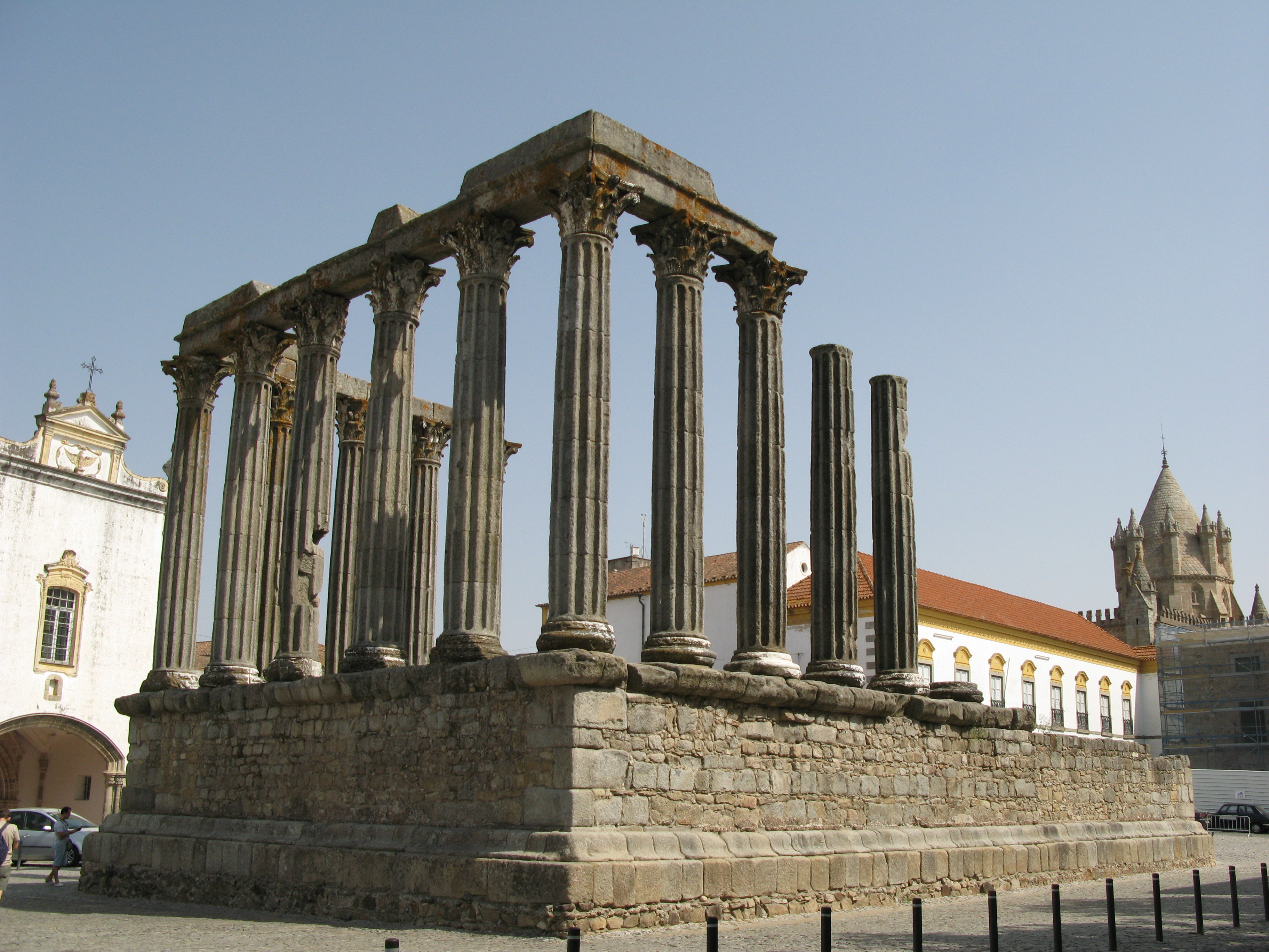 Roman Temple at Evora, Portugal